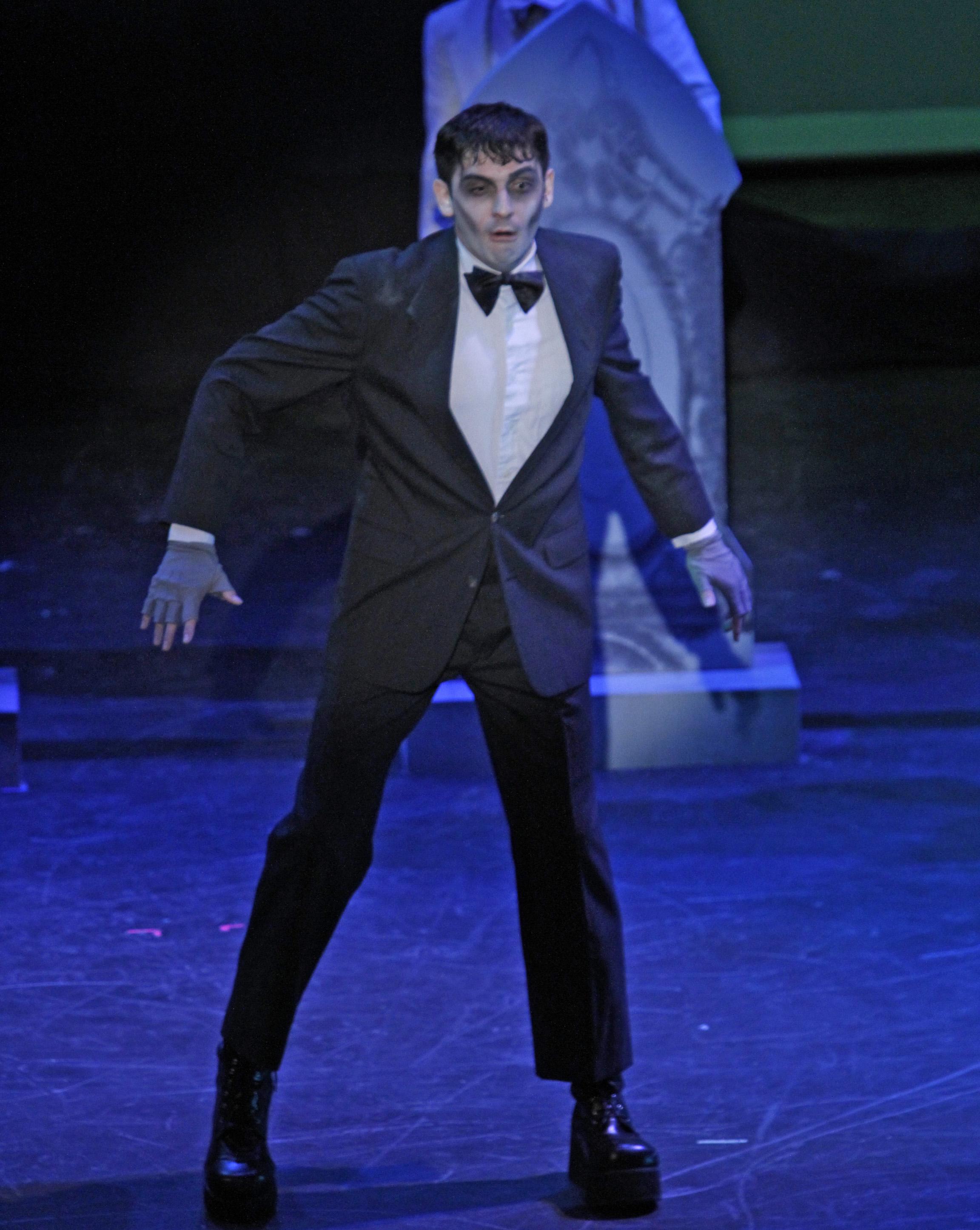 Lurch- Jacob Sundlie Photo by Karl Kuntz